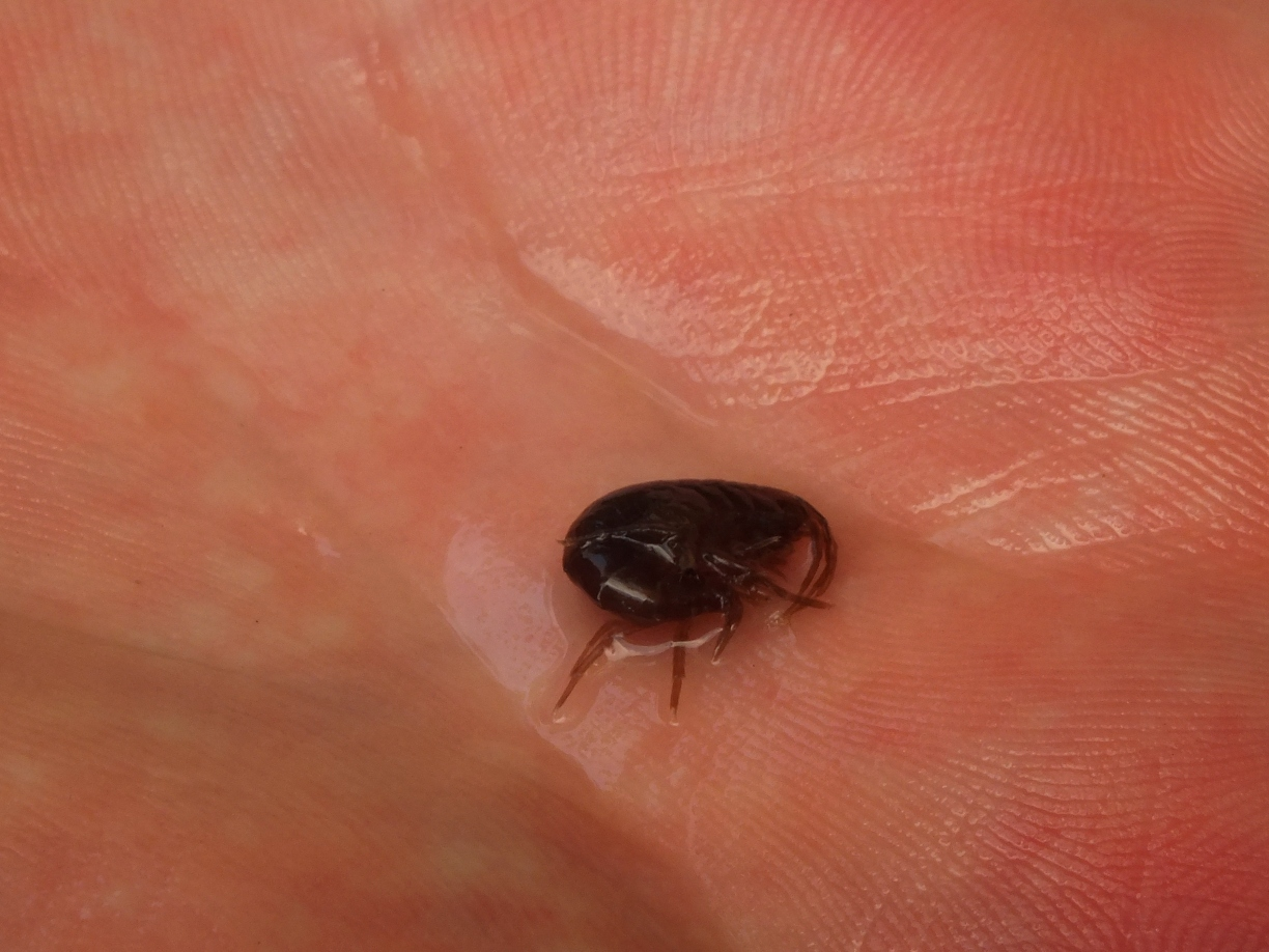 édesvízi rák